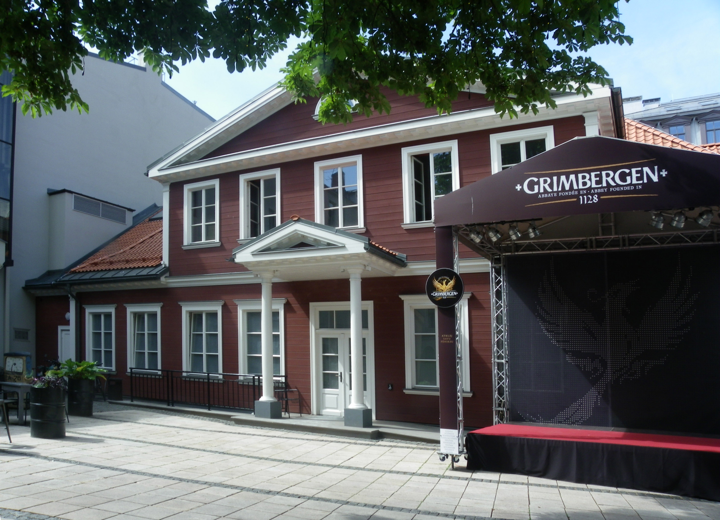 Elizabetes iela Rīgā